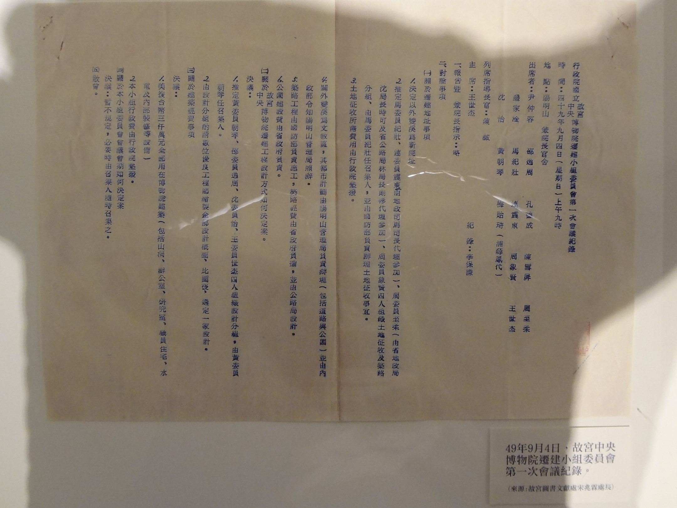 中文（台灣）: 中華民國國立國父紀念館展示的嚴家淦文物：1960年9月4日，行政院國立故宮中央博物院遷建小組委員會第一次會議紀錄。